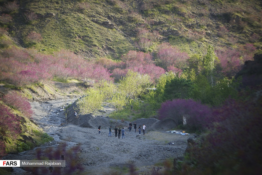 Arghavan valley